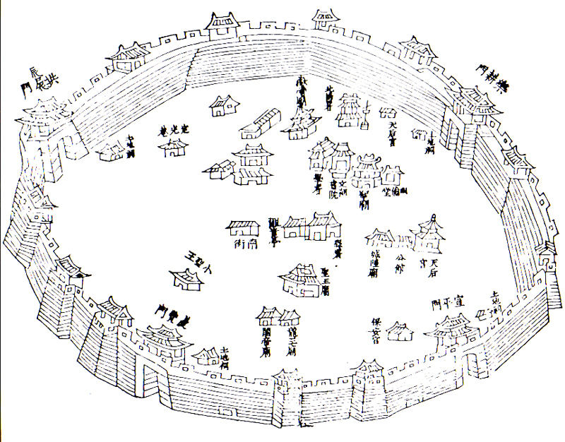 道光年間的彰化縣城示意圖